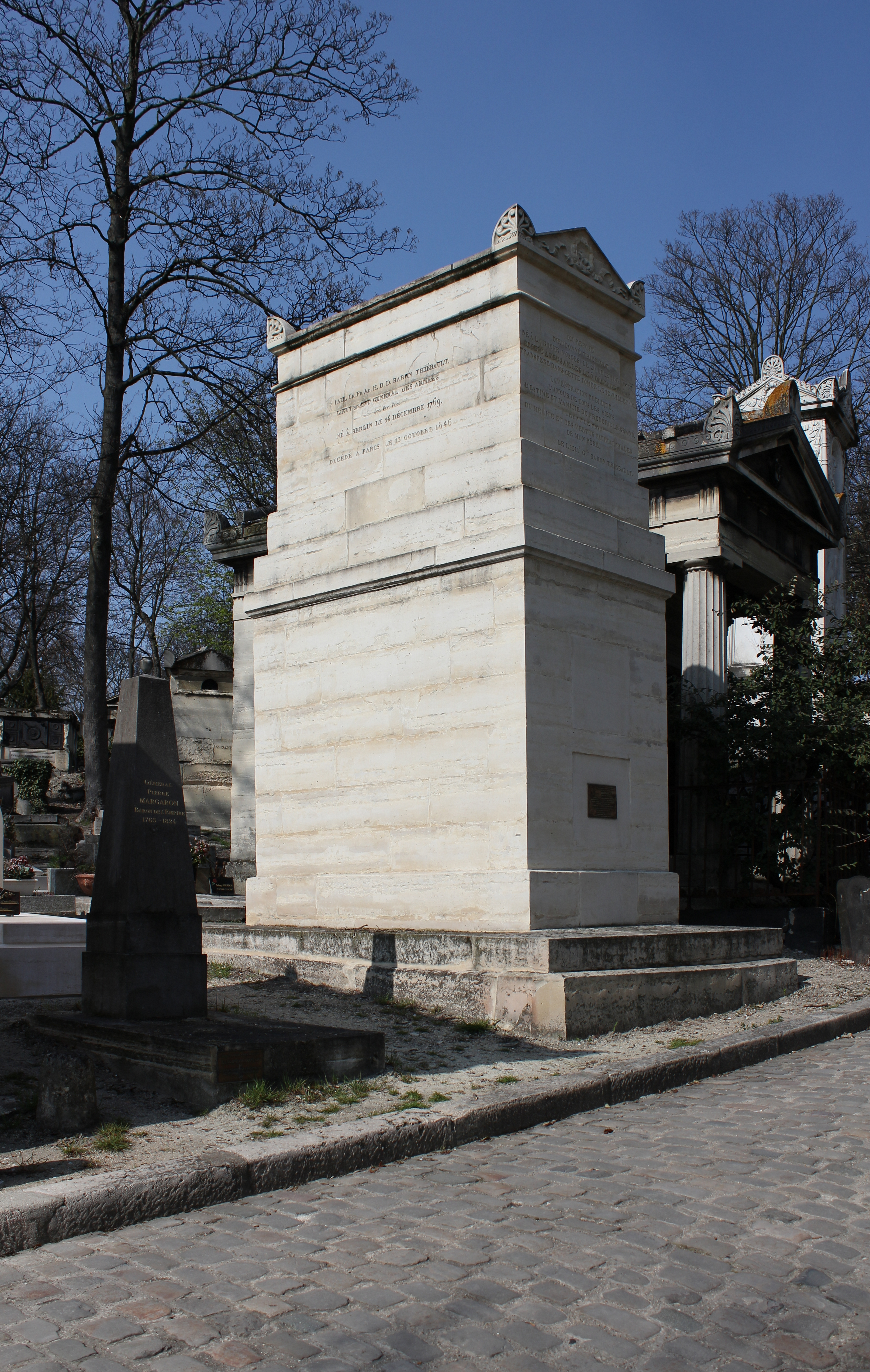 vue d'ensemble